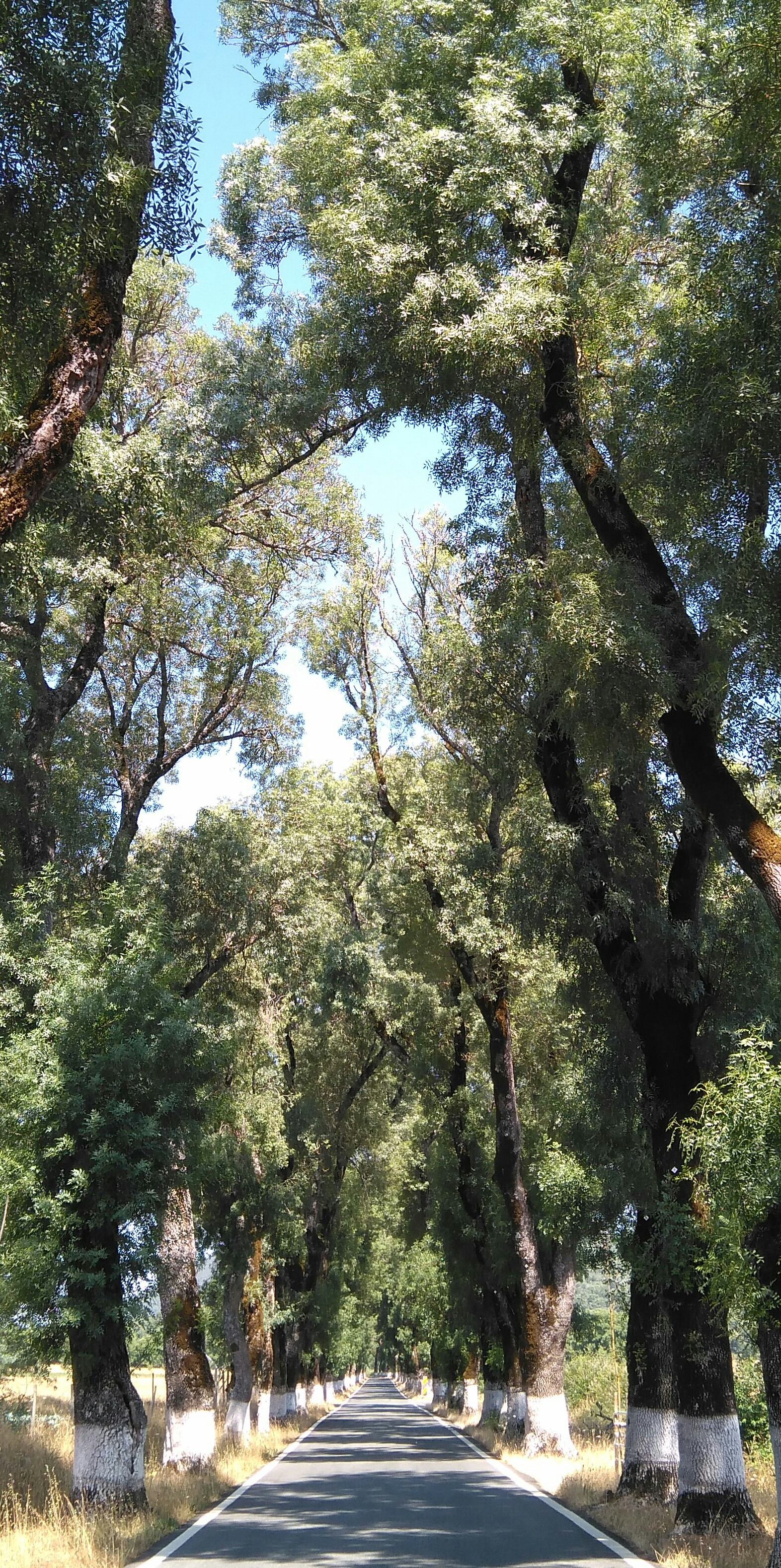 N246-1 de Portagem a Castelo de Vide